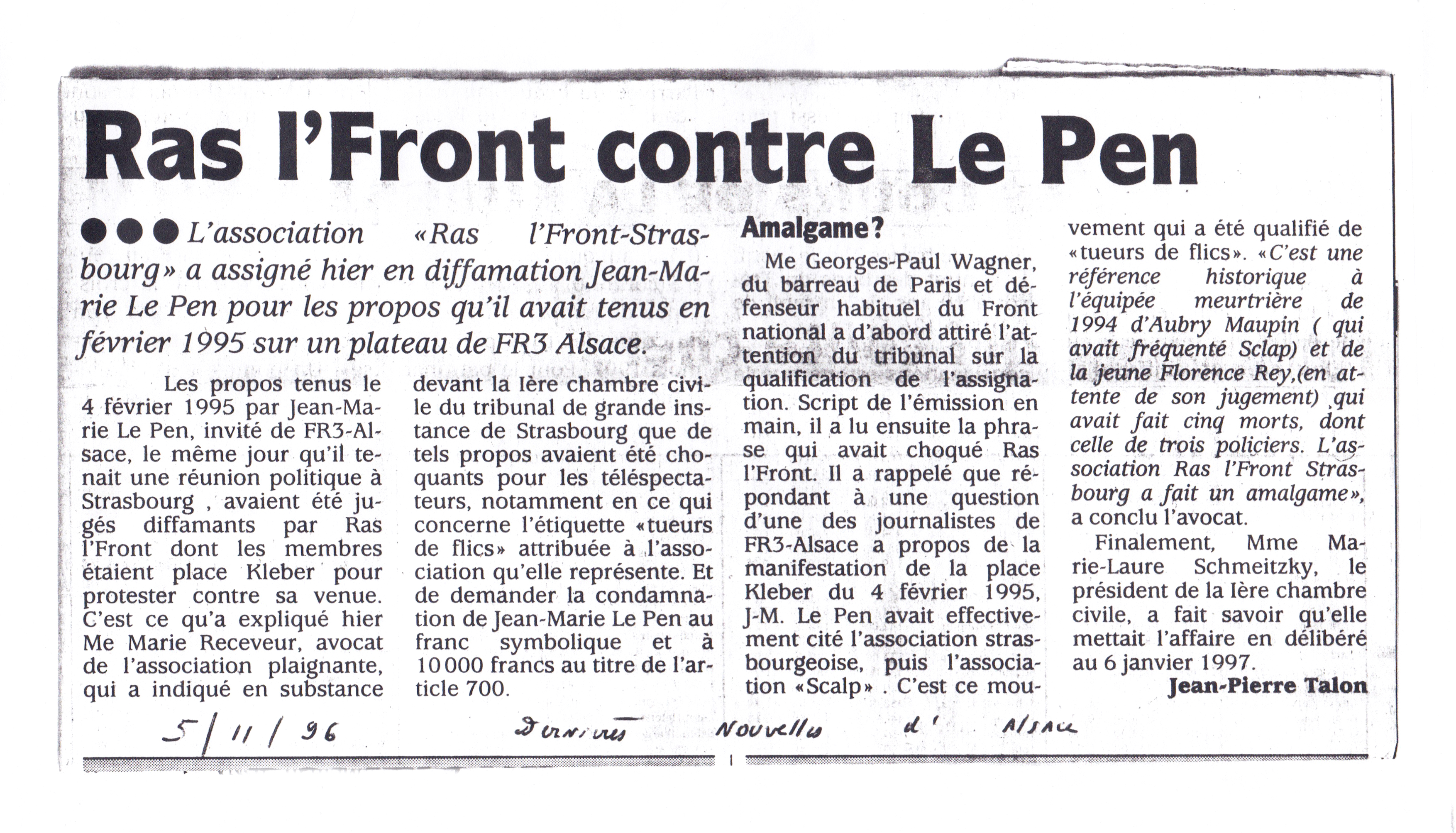 Coupure de presse des Dernières Nouvelles d'Alsace du 5 Novembre 1996. L'association "Ras l'Front-Strasbourg" assigne Jean-Marie Le Pen en diffamation.